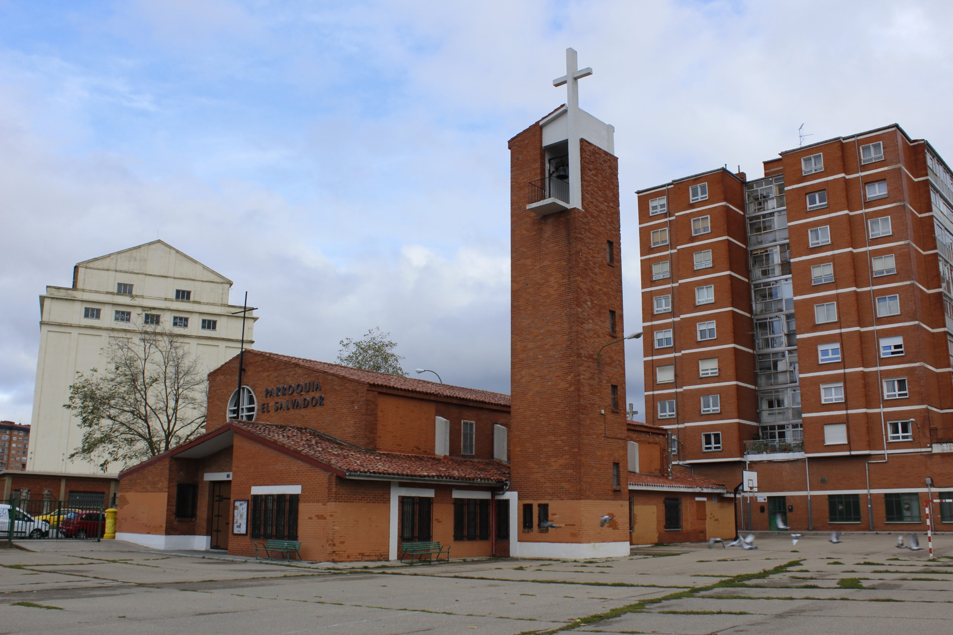 Vista general de la Parroquia El Salvador.